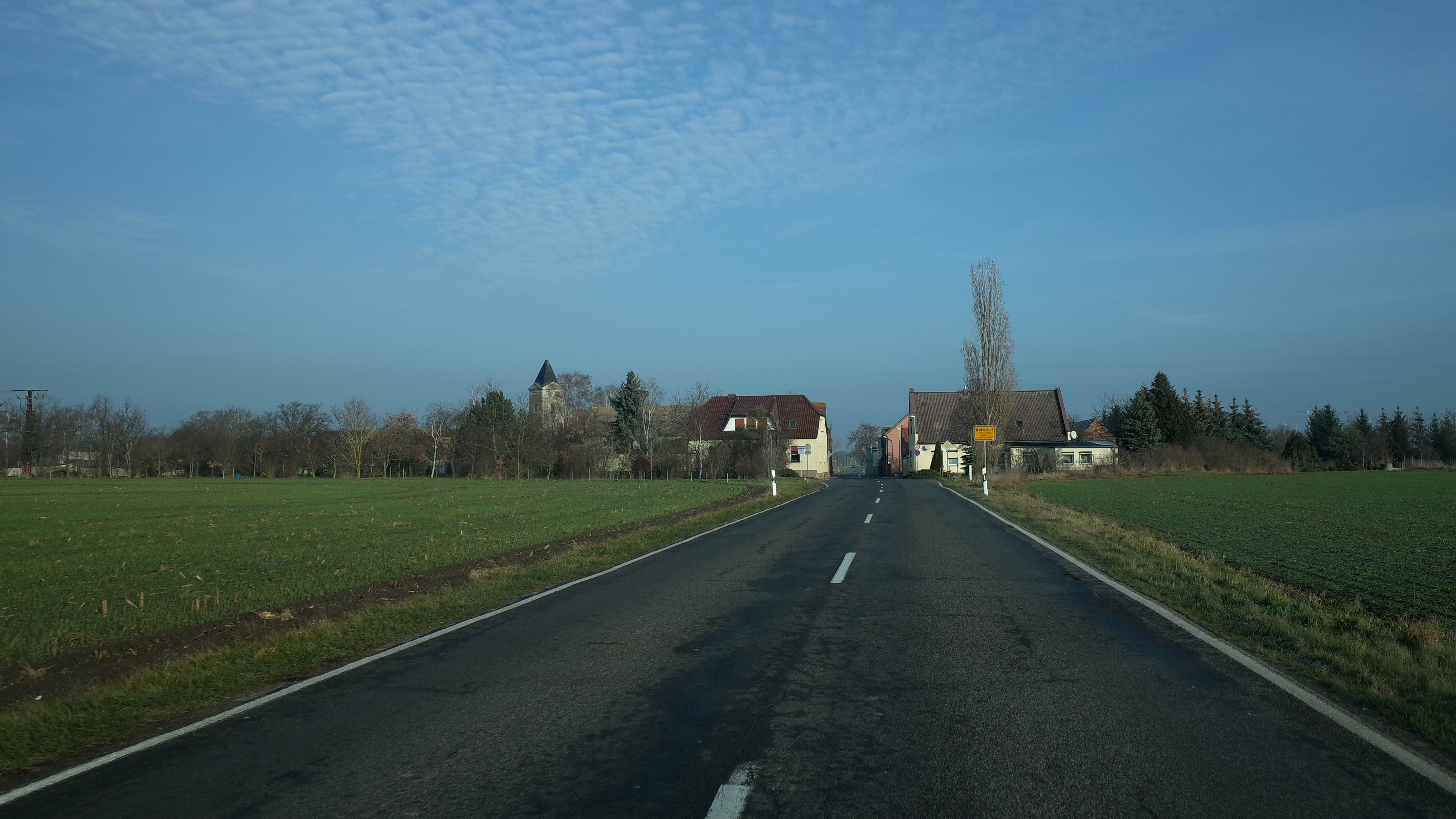 Zörbig, Ortsteil Wadendorf, Ortseingang aus Richtung Zörbig